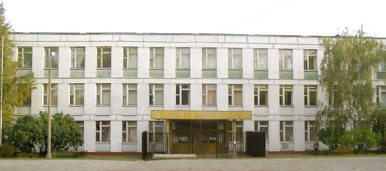 Гимназия 1515